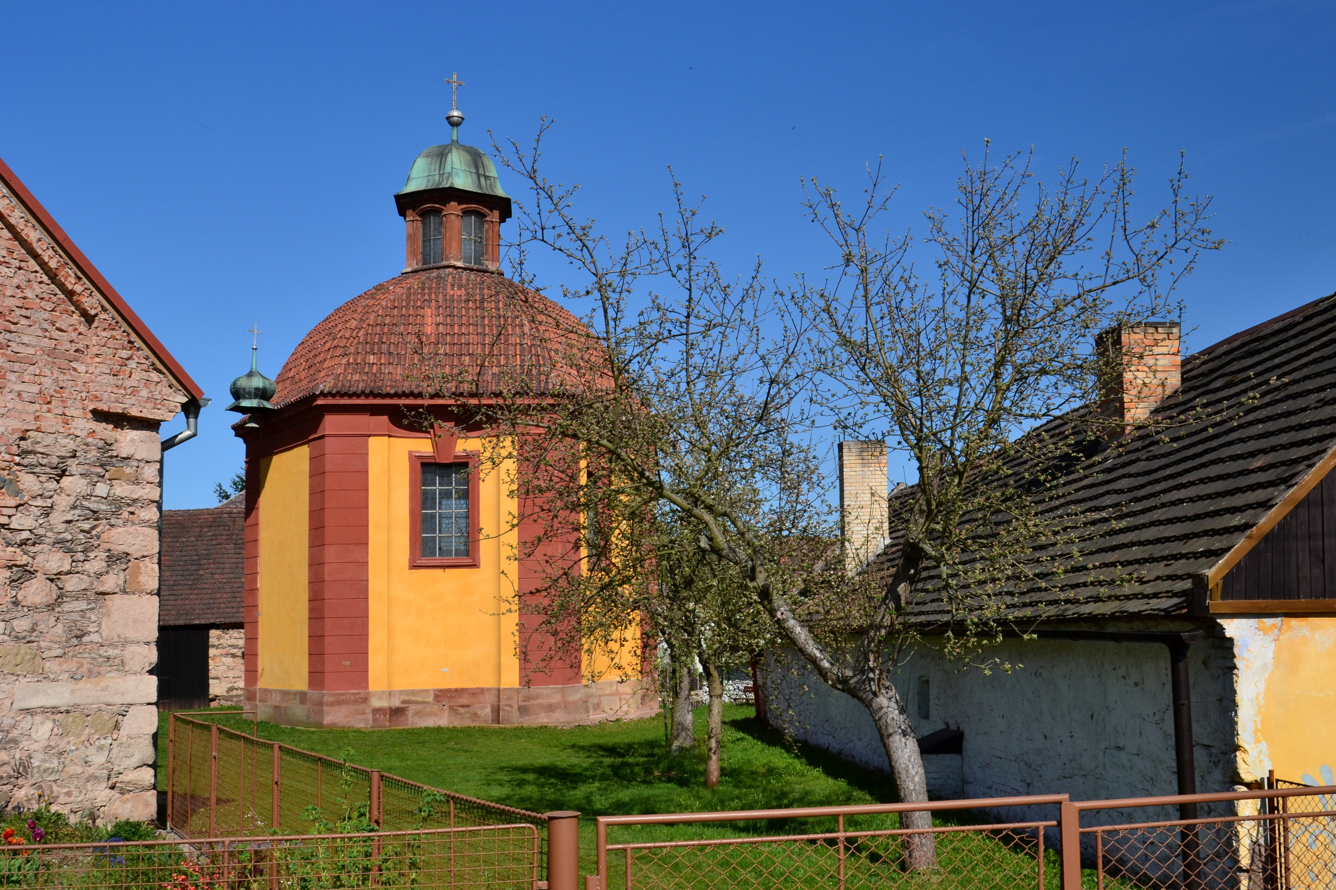 Kaple Panny Marie, na dvoře statku, Mladotice (okres Plzeň-sever).